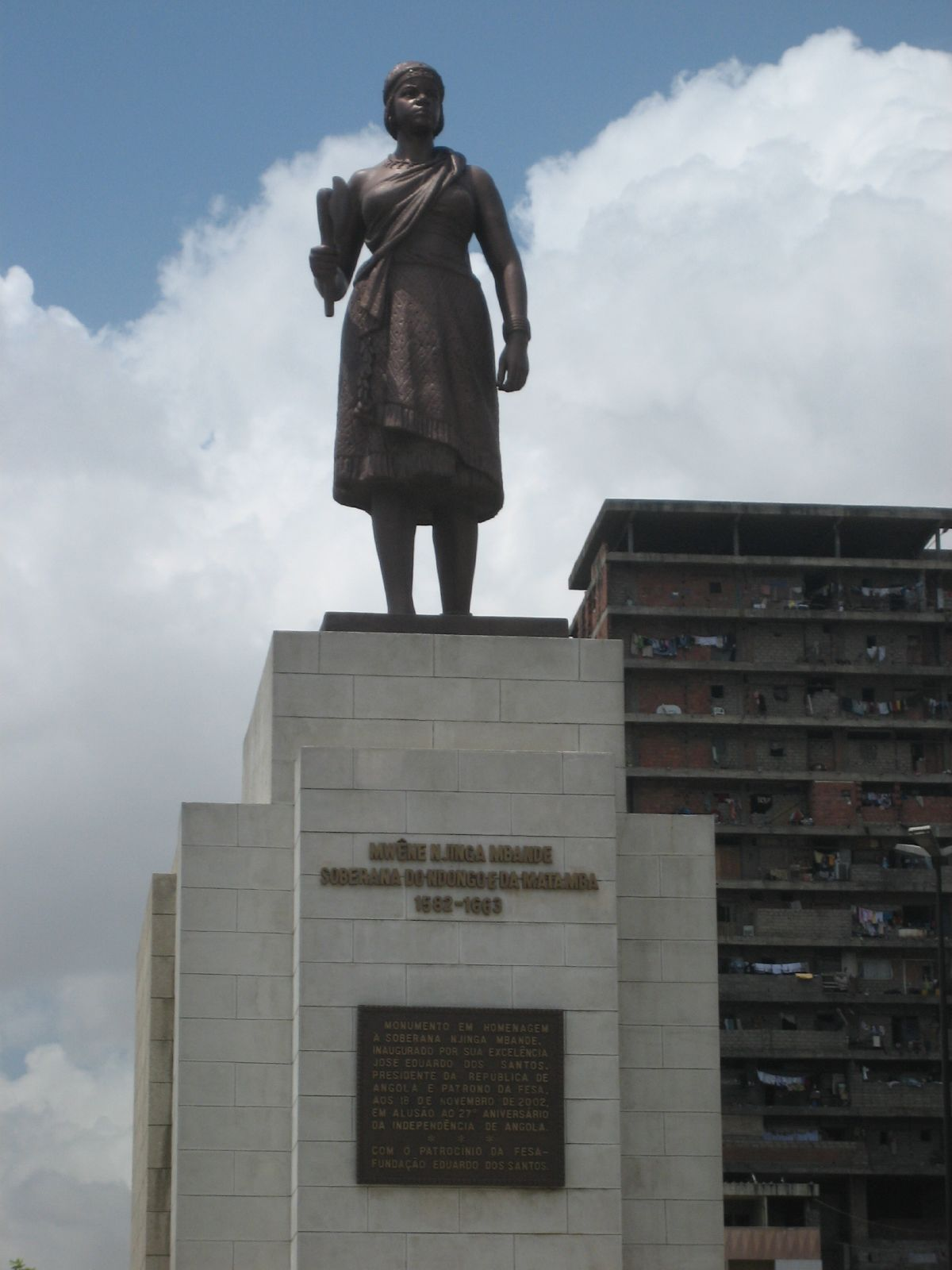 Estátua de Dona Ana de Sousa, Ngola Ana Nzinga Mbande, rainha de Ndongo e Matamba, Luanda, Angola.